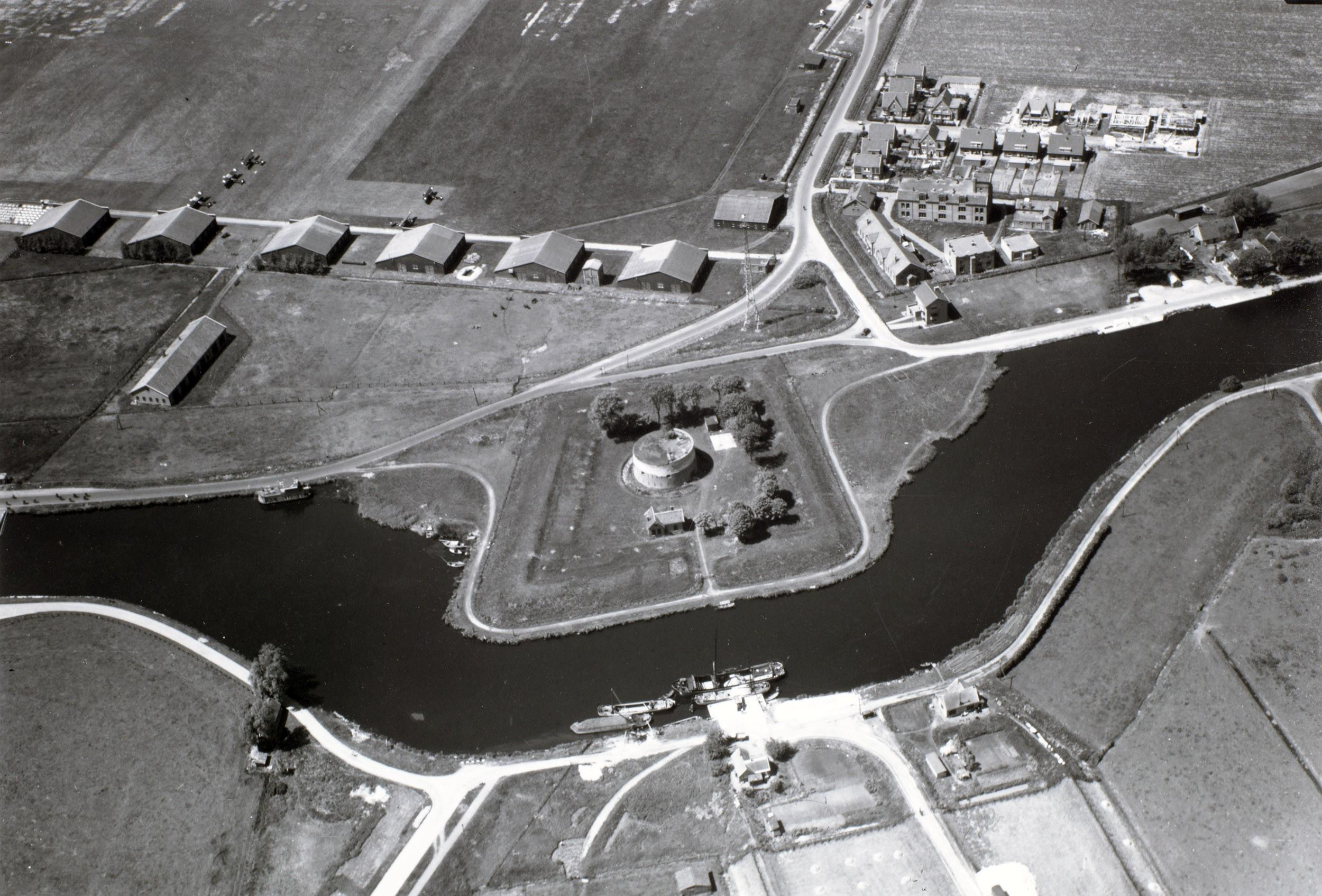 Luchtfoto van Fort Schiphol. Linksboven is een gedeelte van het vliegveld zichtbaar.